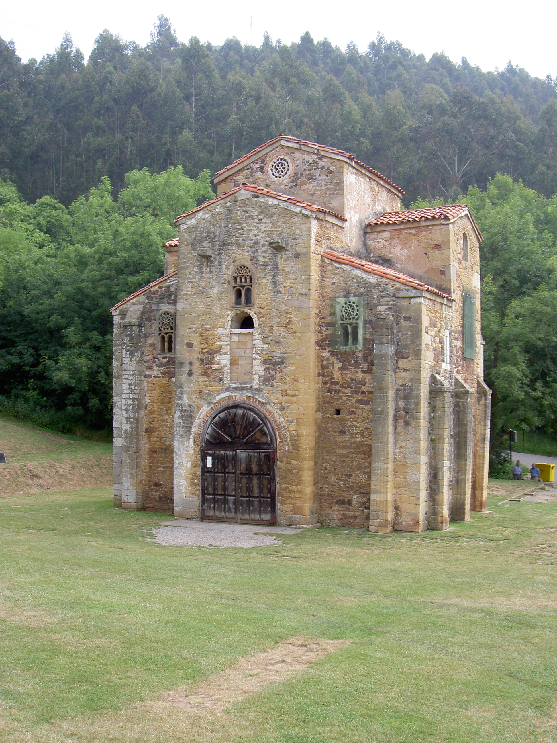 San Miguel de Lillo (Oviedo) Autor: G.Wansorra